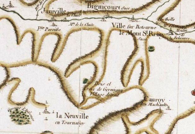 Germiny-Pend-la-Pie, sur la carte de Cassini. Sur ce plan, Germigny est mal situé.